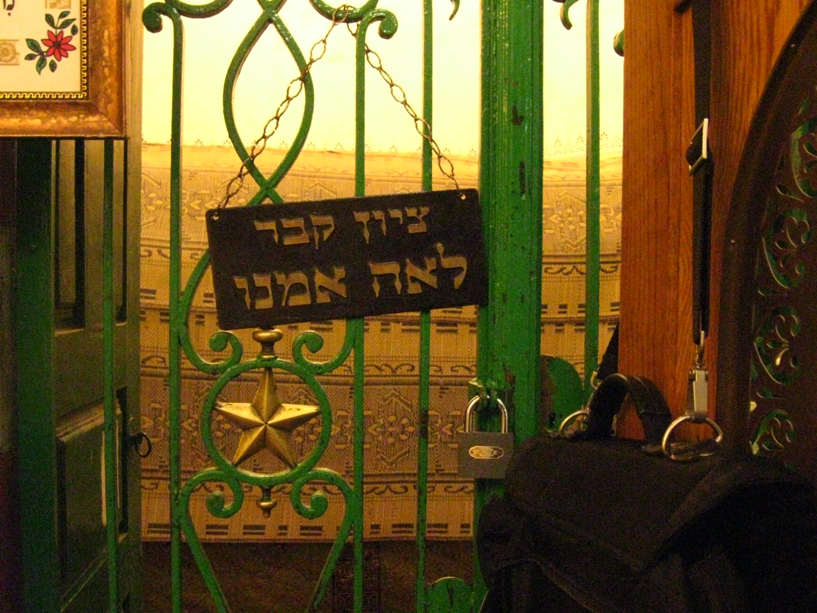 ביקור במערת המכפלה 2010